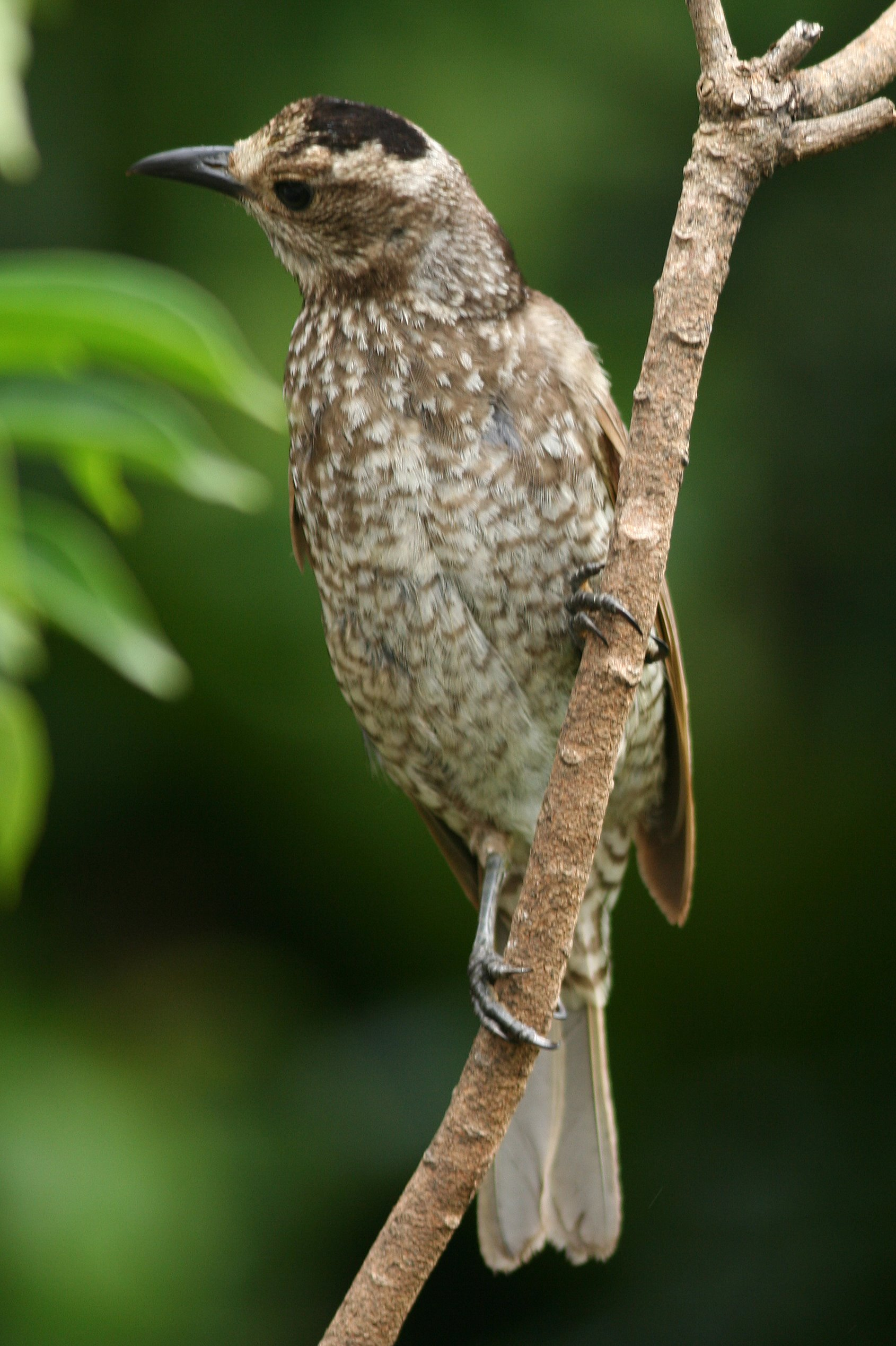 Regent Bowerbird, Sericulus chrysocephalus, female; wild bird